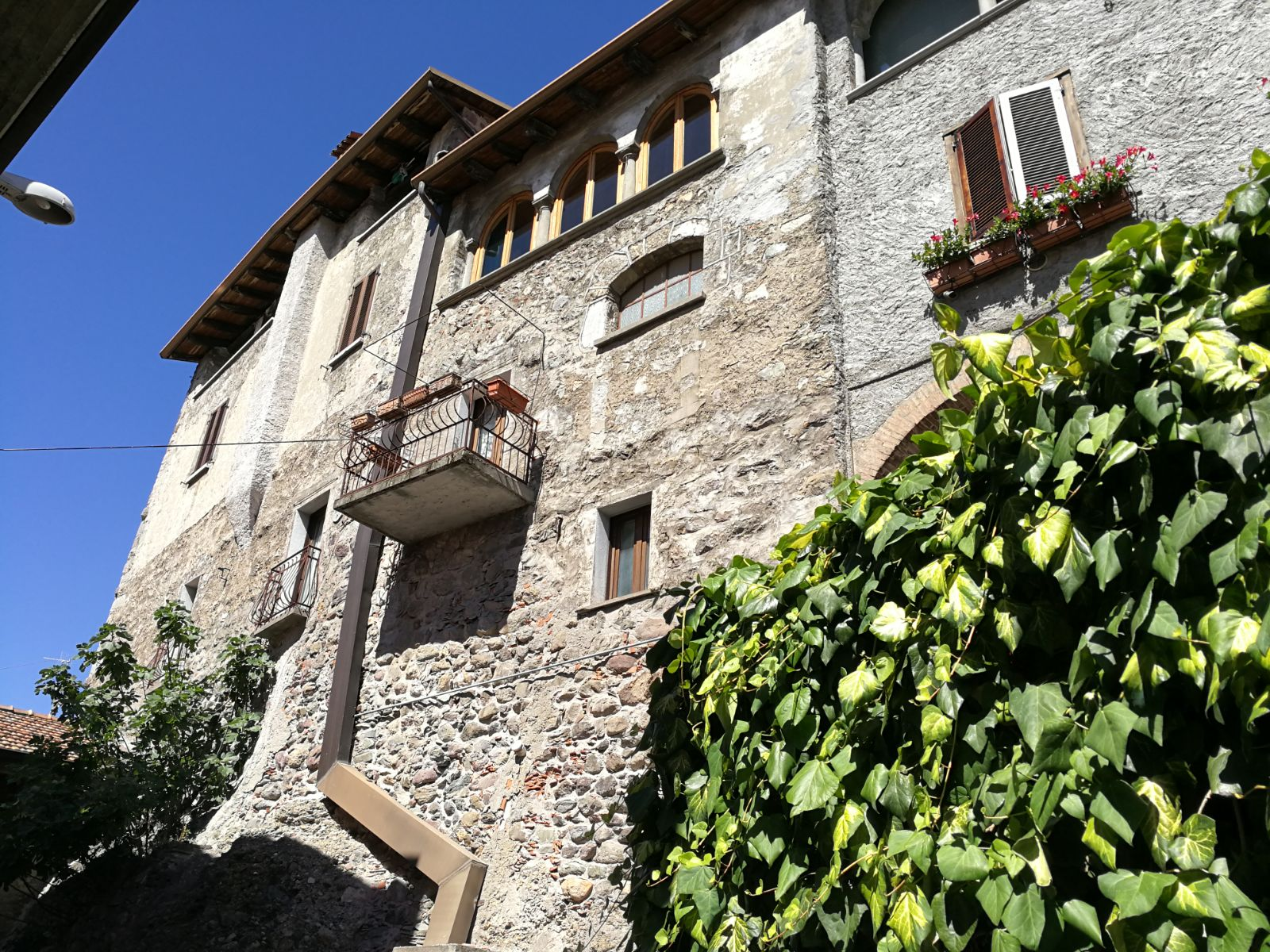 Palazzo Celeri nel centro storico di Corti